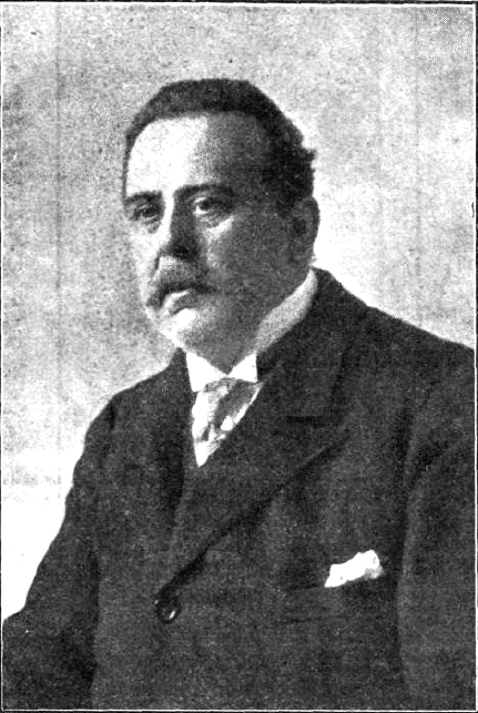 Fotografía del escritor español Narciso Díaz de Escovar publicada en 1912 tras la aparición de su libro de coplas titulado Guitarra andaluza